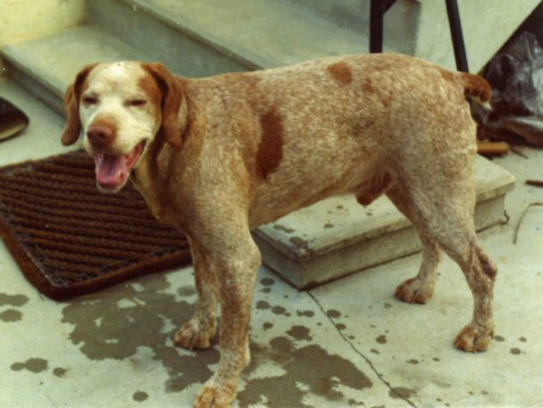 Rasteau/Pyrrhus, fondateur des braques du Bourbonnais, photographie au domicile de Gabriel Comte